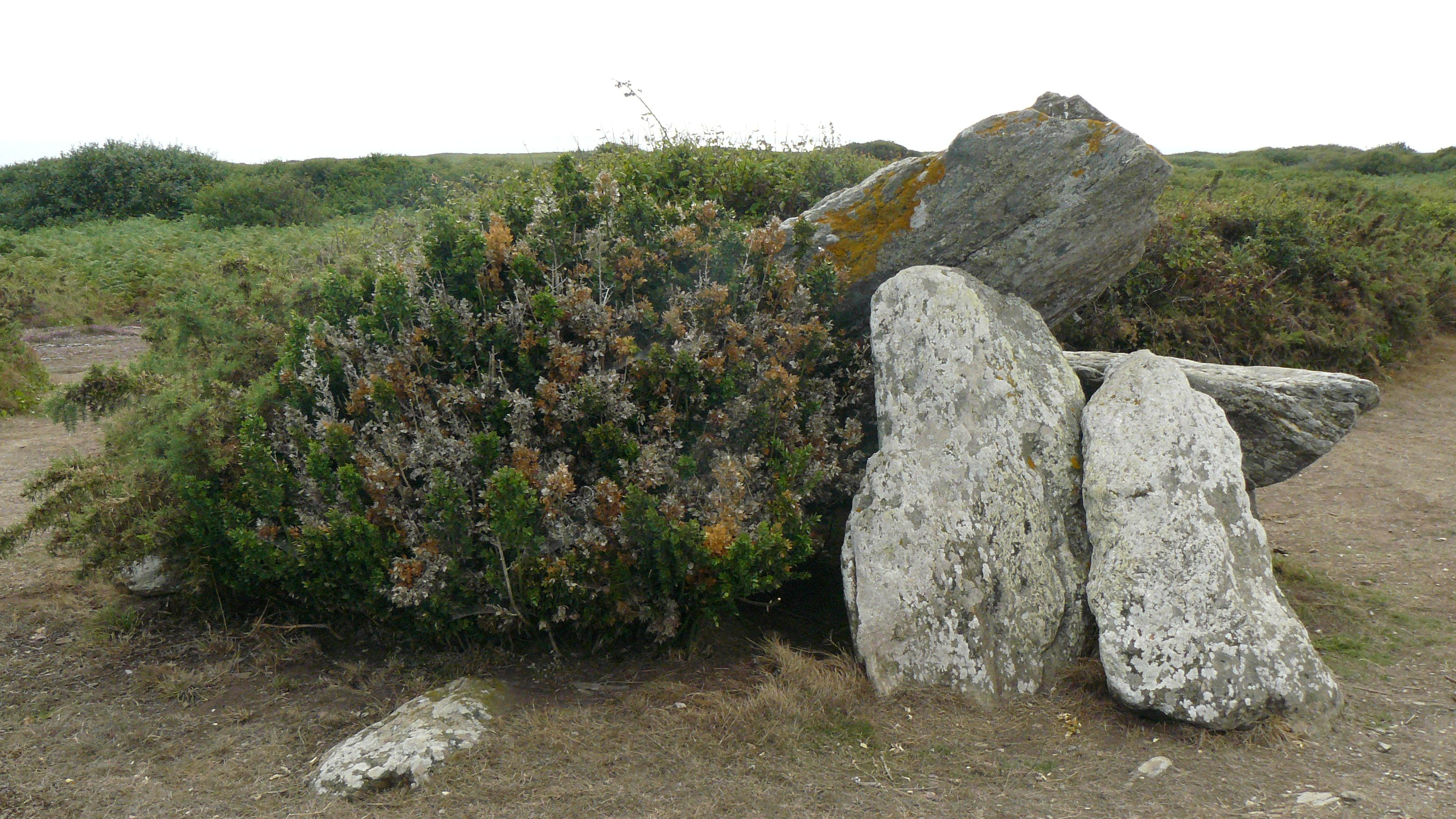 Dolmen en V présent sur l'île de Groix près du hameau de Kerlard.